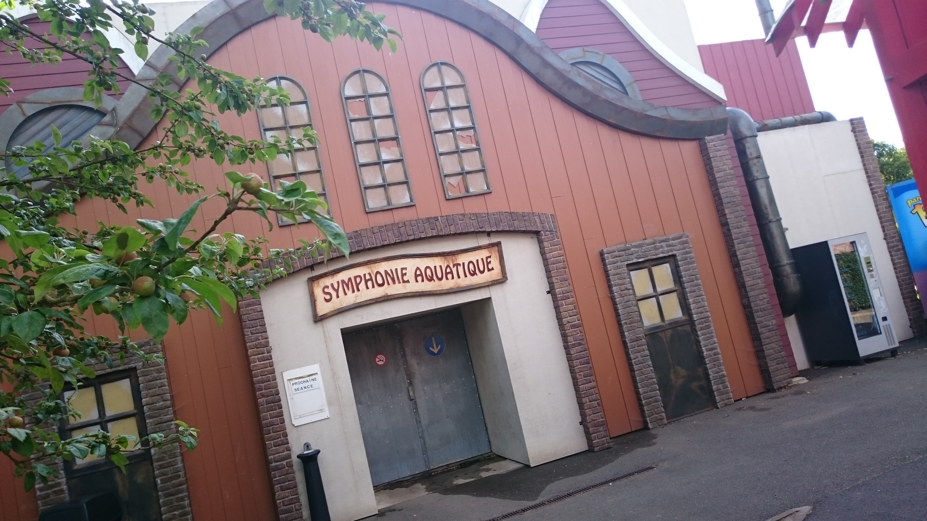 La Symphonie Aquatique